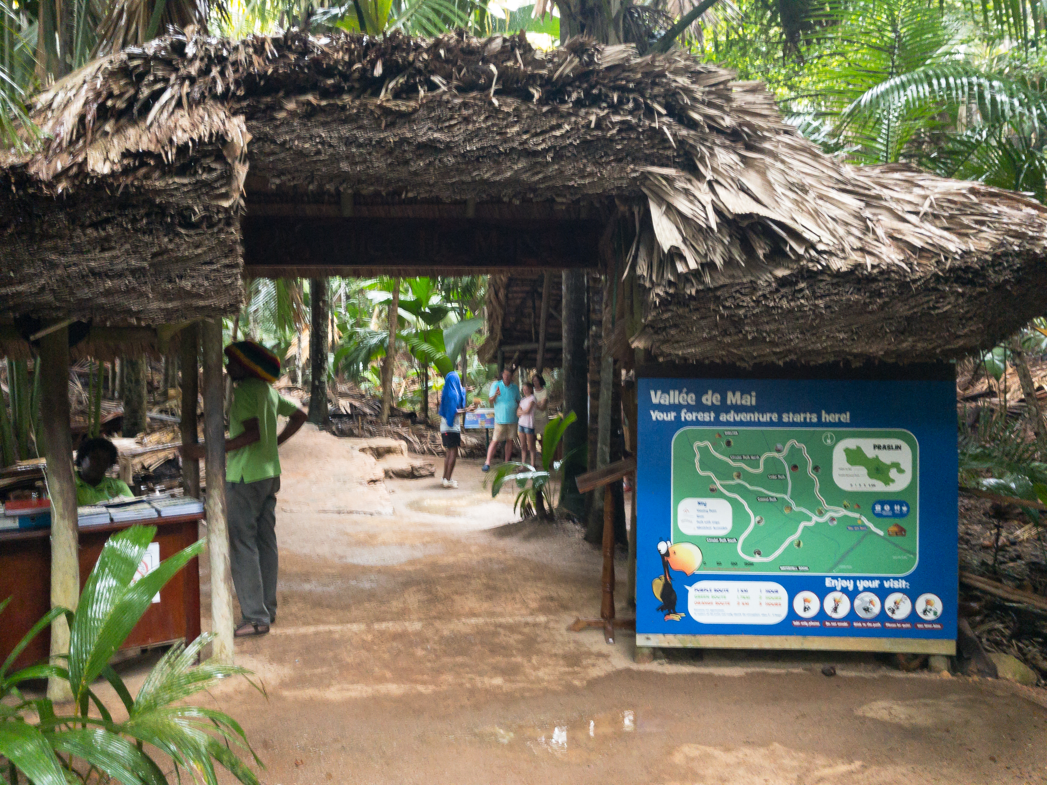 Vallée de Mai Nature Reserve, Praslin